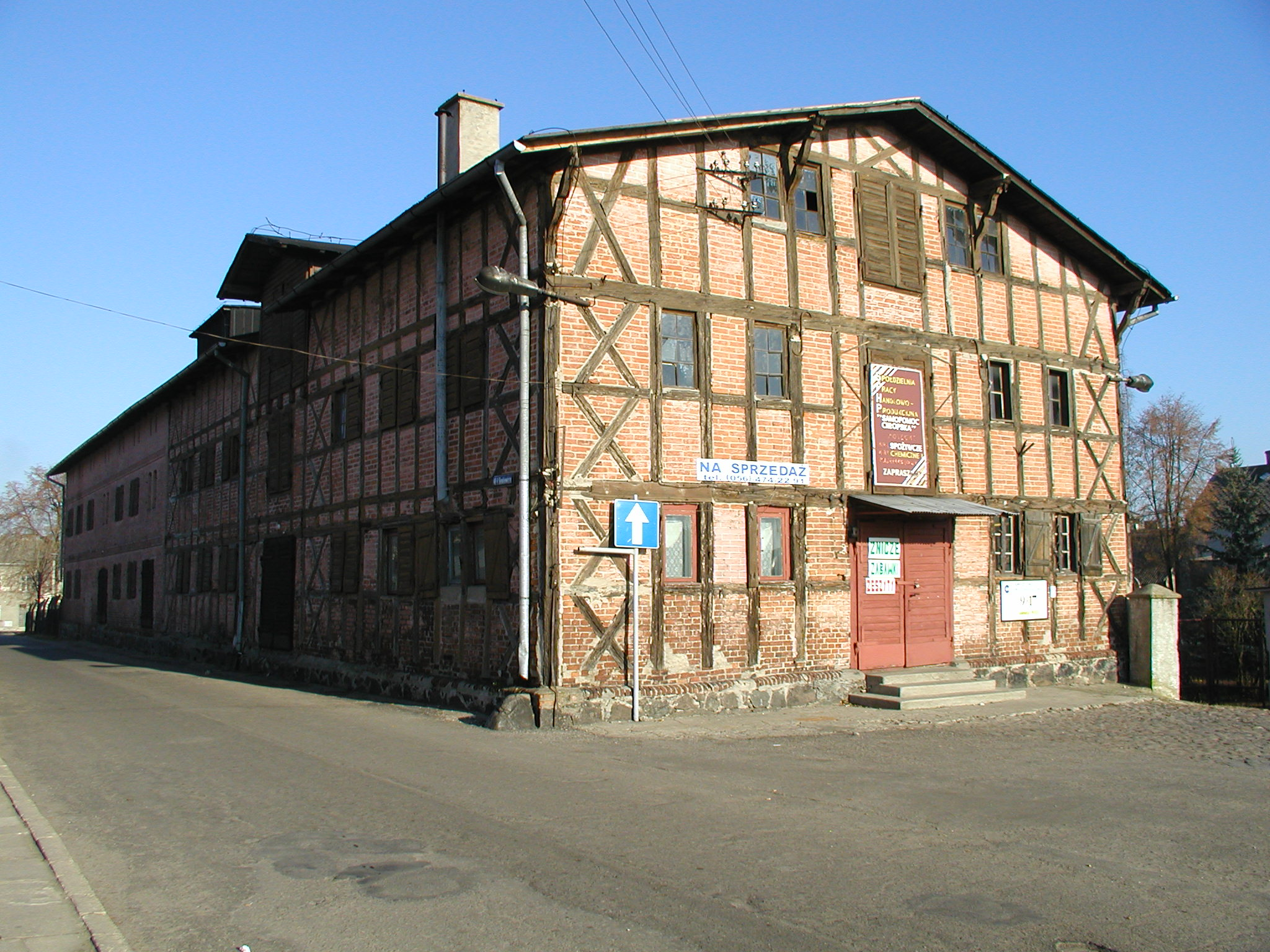 spichlerz (ob. magazyn i sklep) z otoczeniem Nowe Miasto Lubawskie, ul. 3 Maja 16, Nowe Miasto Lubawskie (gmina miejska)